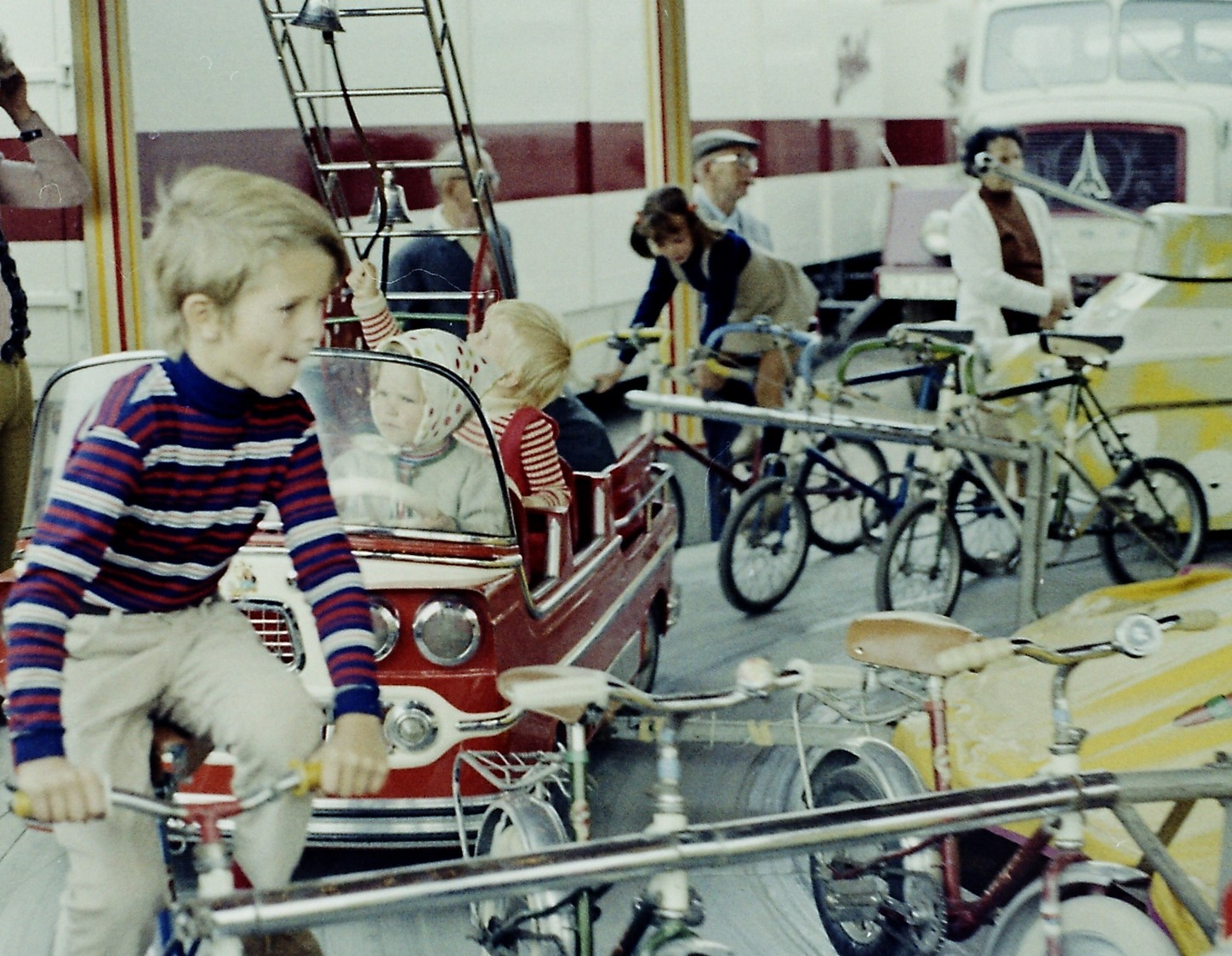 Deutschland (D) - Nordrhein-Westfalen (NW) - Kreis Lippe (LIP) - Bad Salzuflen - Wüsten: Kirmes 1970